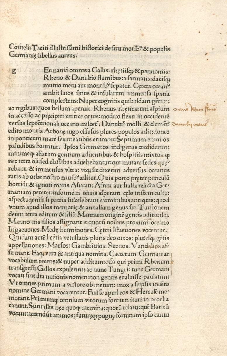 Tacitus Germania 1,1f. aus der Erstausgabe von 1472, gedruckt in Venedig durch Wendelin de Spira.